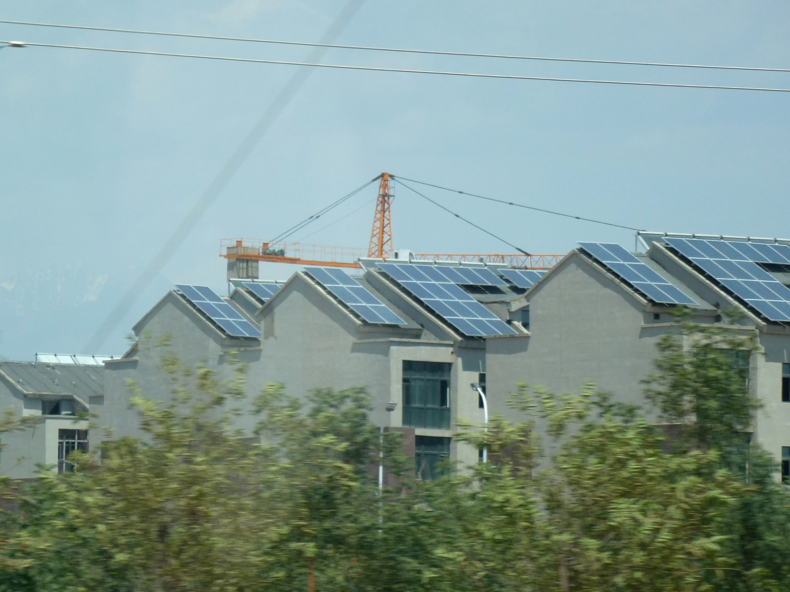 Constructions en cours. Habitat urbain, banlieue de Tourfan. Juillet 2012